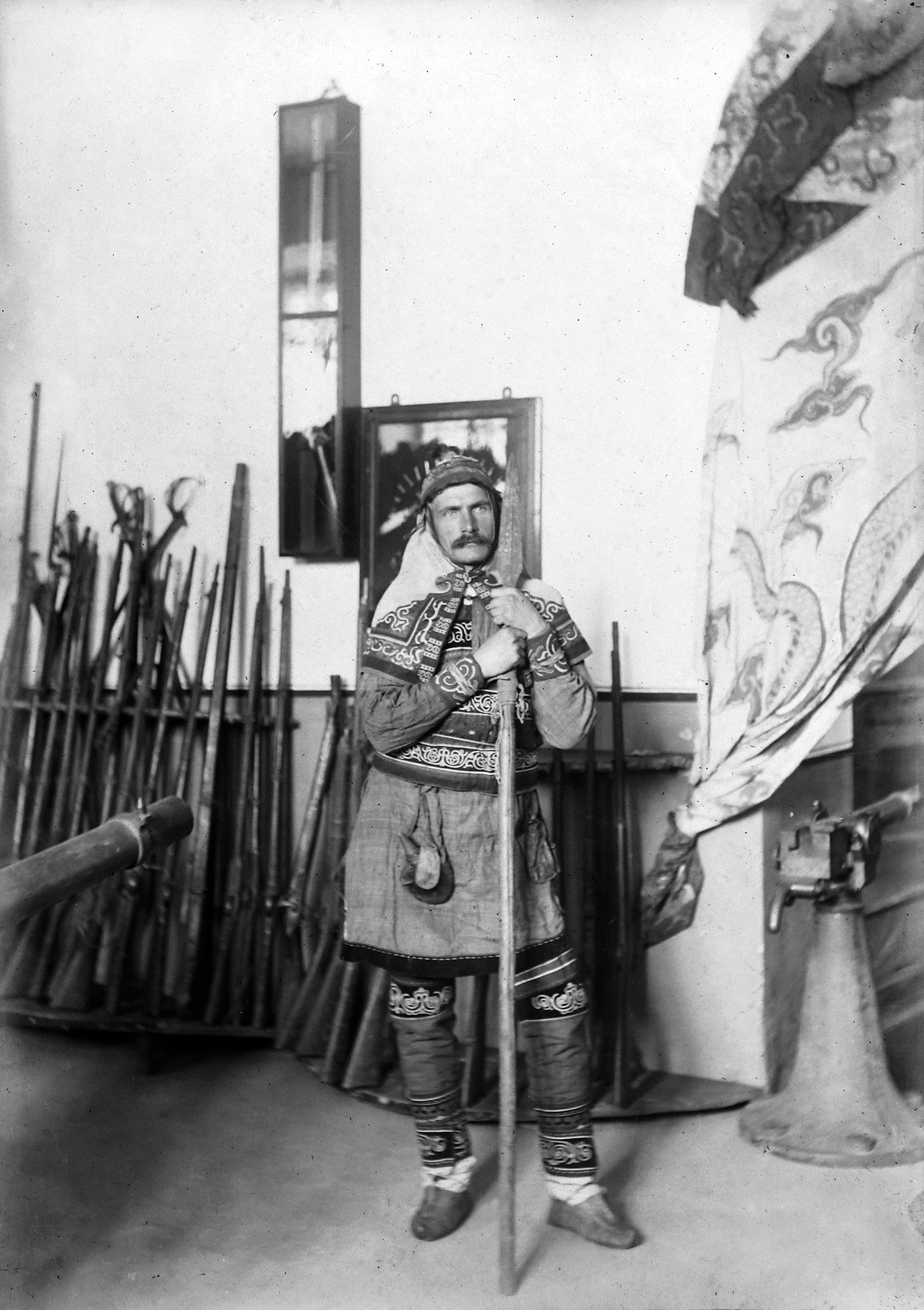 Владимир Клавдиевич Арсеньев, директор Гродековского музея Приамурского отдела ИРГО в костюме охотника-ороча у экспонатов музея